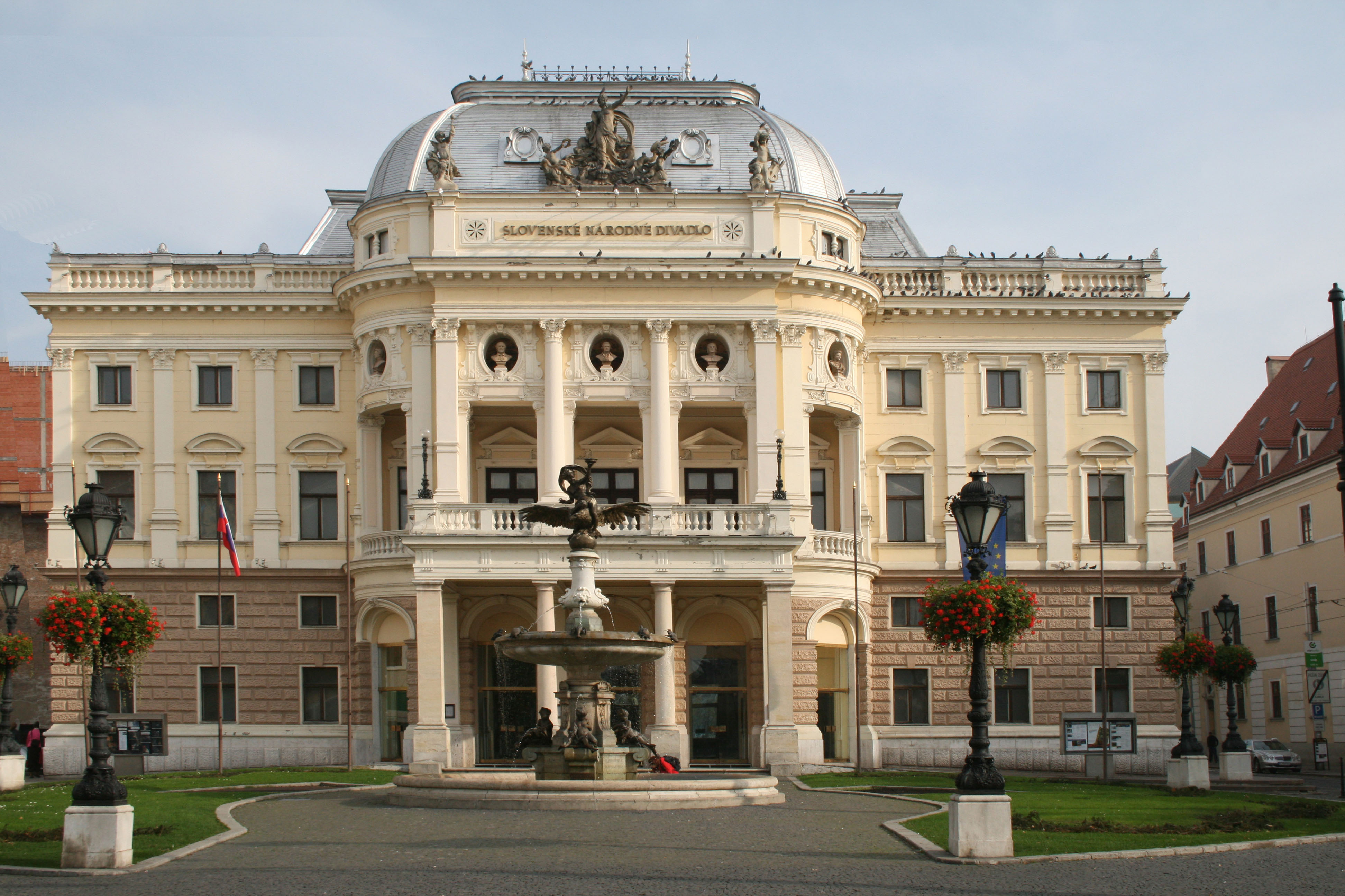 Novorenesančná budova opery Slovenského národného divadla z roku 1886.Autormi projektu F. Fellner a H. Helmer